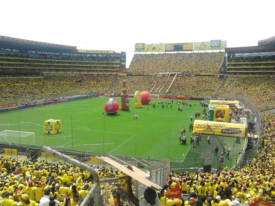 Panorámica del estadio Monumental previo al partido final antes de la coronación del Barcelona Sporting Club como campeón del fútbol ecuatoriano. Foto tomada por Adrián García.